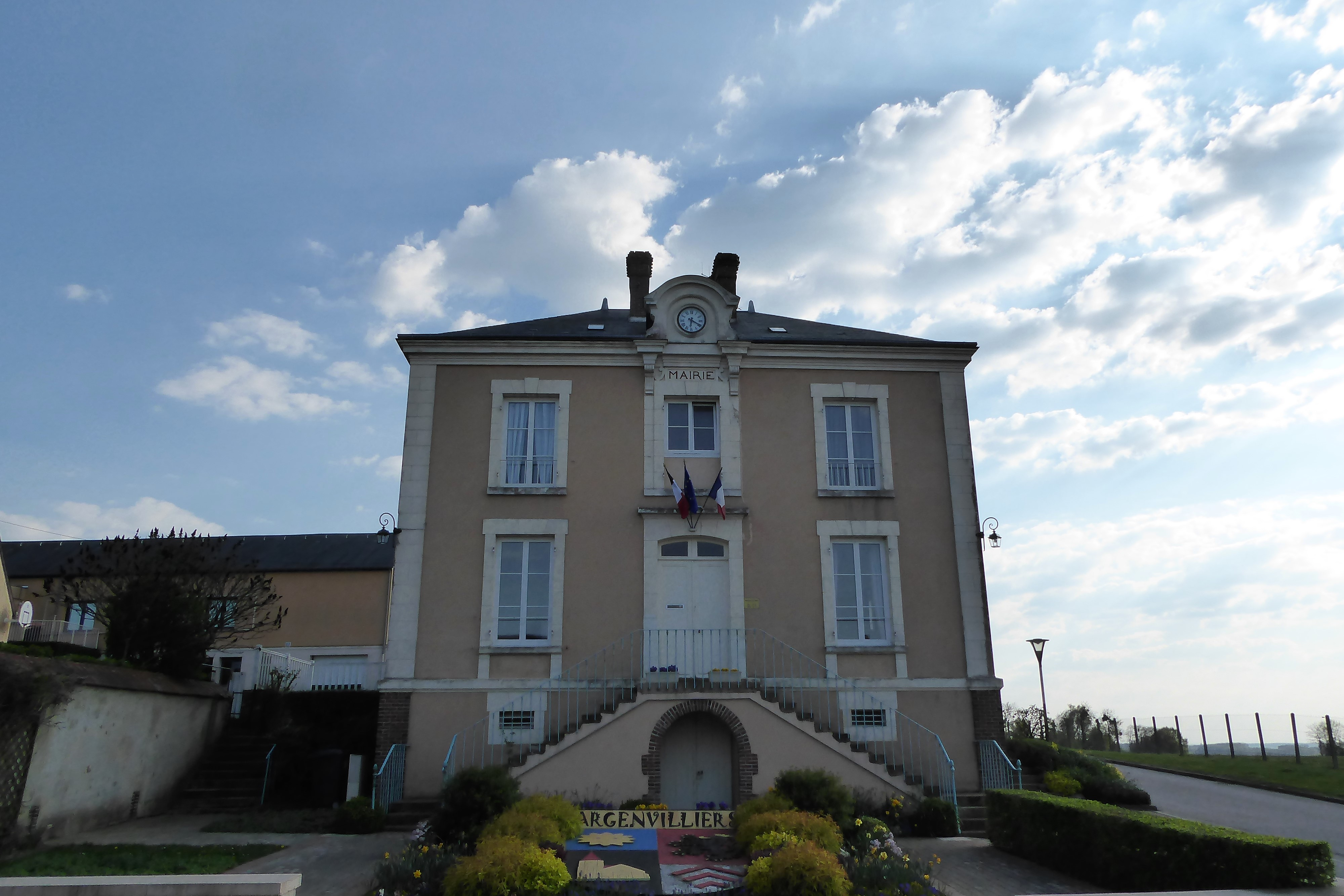 mairie d'Argenvilliers, Eure-et-Loir, France.